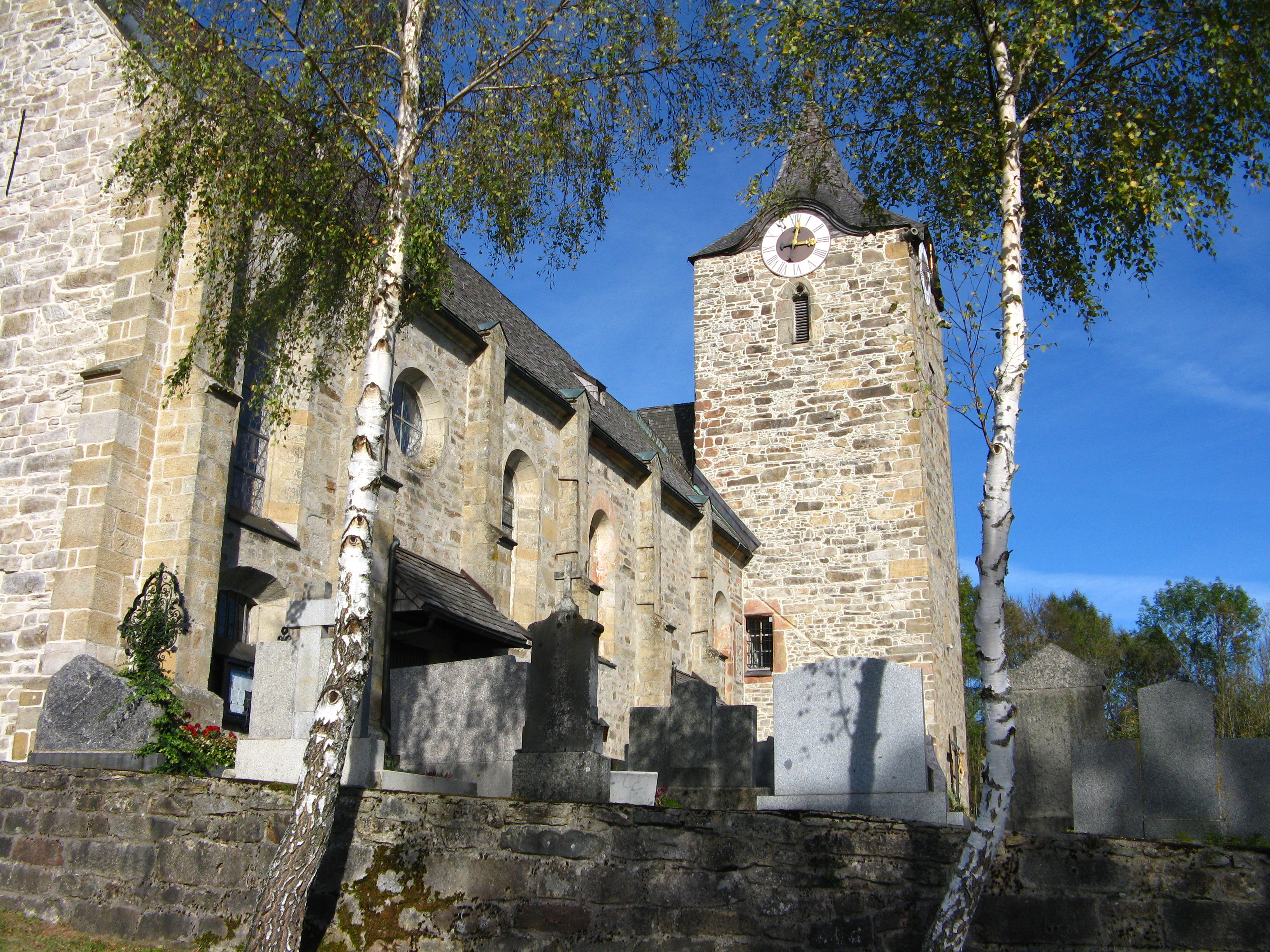 Katholische Pfarrkirche St. Gotthardt in Kirchberg im Bayerischen Wald, Landkreis Regen